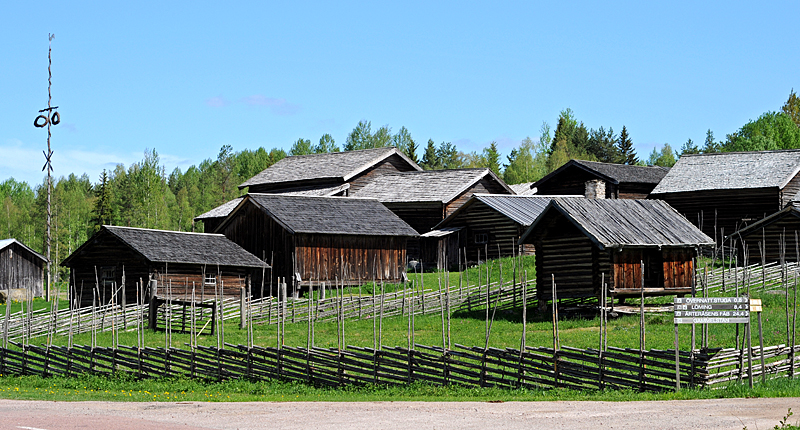 Norrboda gammelstad i Rättvik